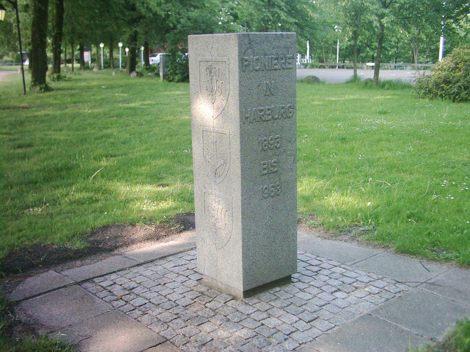 Pionierstein auf dem Schwarzenberg in Hamburg-Harburg. Gestiftet 1968 von den Unterelbepionieren anläßlich ihrer Verlegung von Harburg nach Stade.